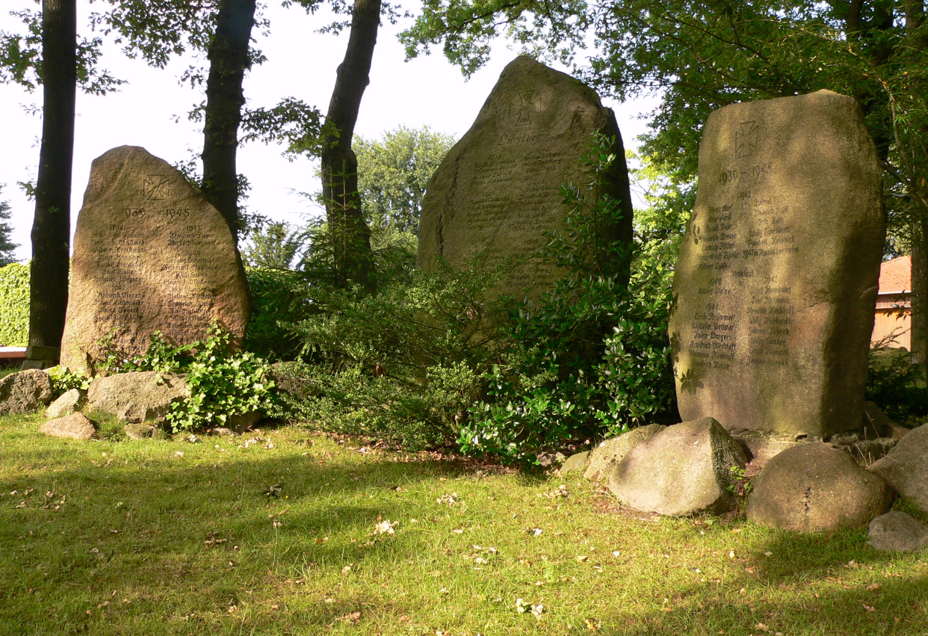 Kriegerdenkmal Linsburg, der mittlere Stein ist ein Findling vom Großsteingrab Linsburg und trägt die Namen der im Ersten Weltkrieg 33 gefallenen Soldaten aus Linsburg, die beiden anderen Steine tragen die Namen von Gefallenen im Zweiten Weltkrieg